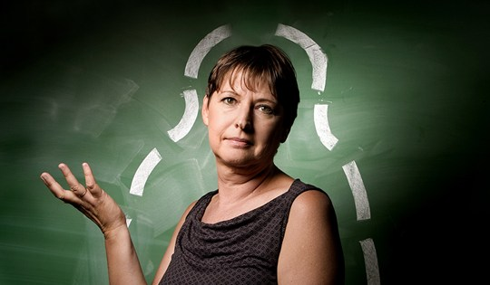 פרופסור לגנטיקה בת שבע כרם